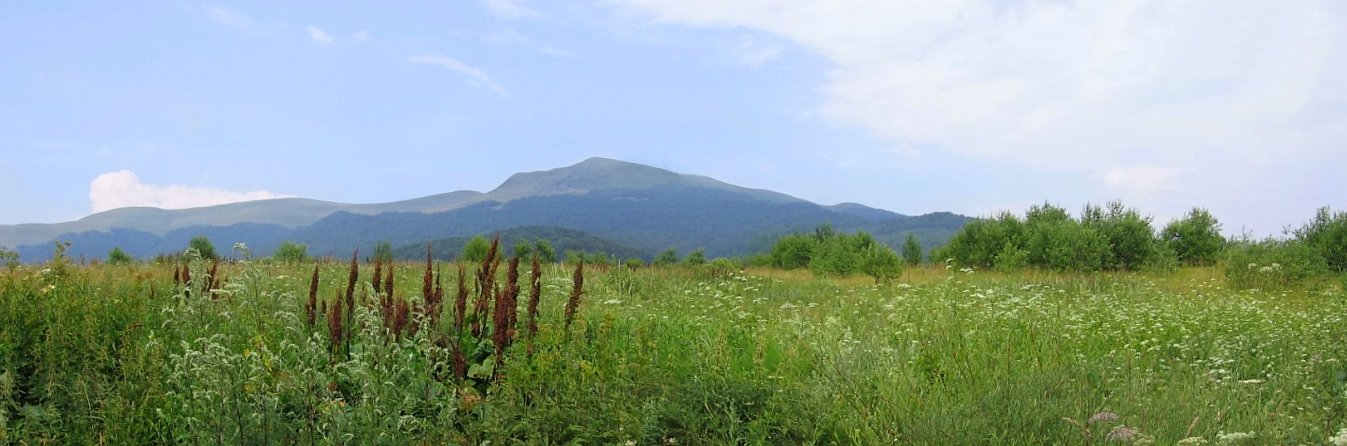 Tarnica seen from Wołosate / Tarnica od strony Wołosatego